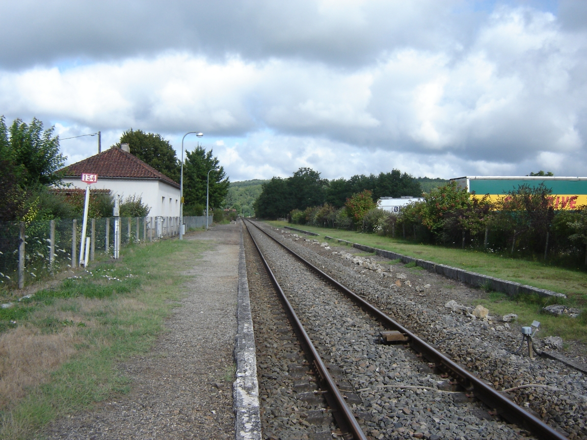 Gare de La Rivière-de-Mansac, Corrèze, France